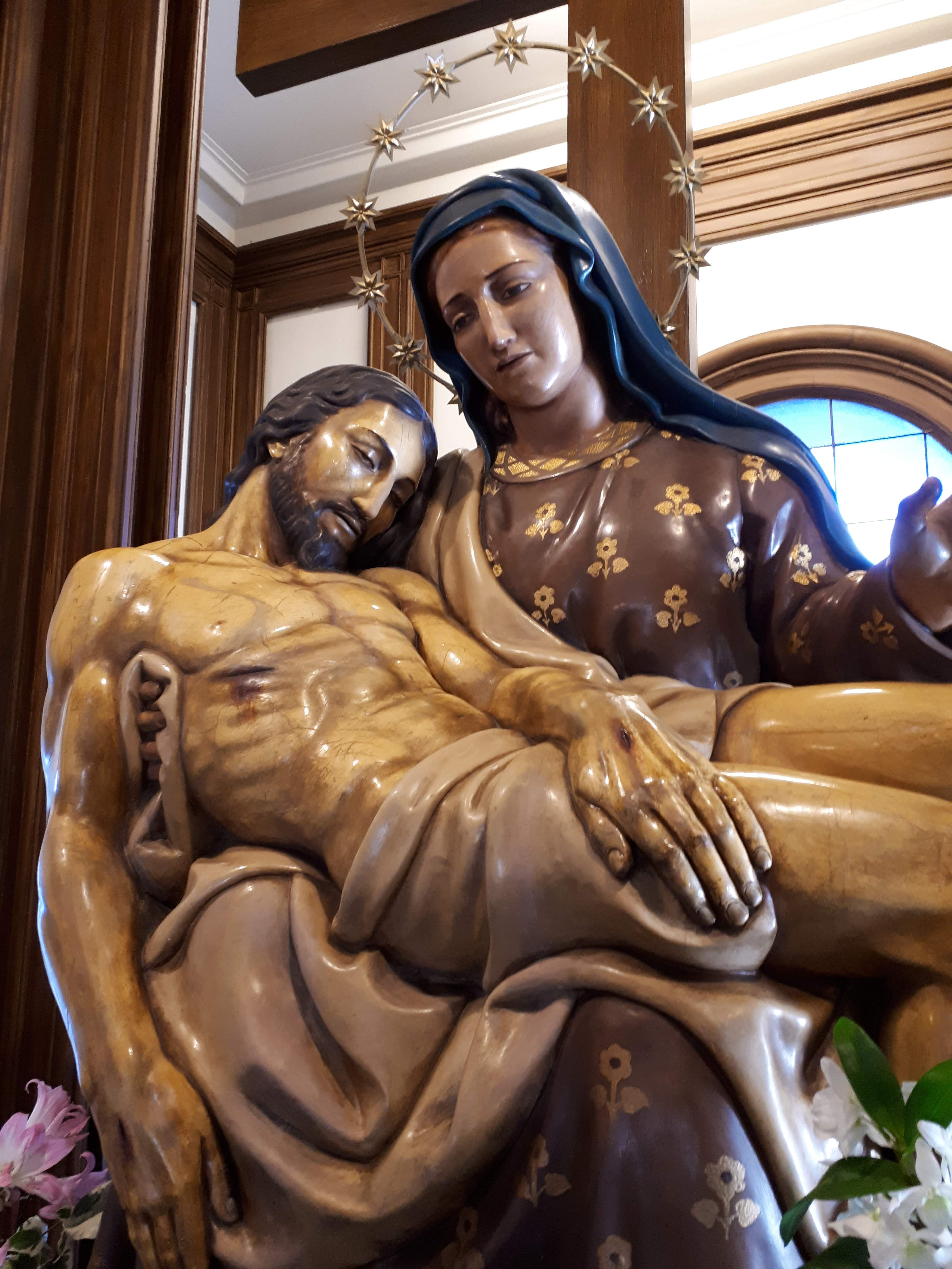 Capella de la Mare de Déu de la Pietat (Arbúcies)